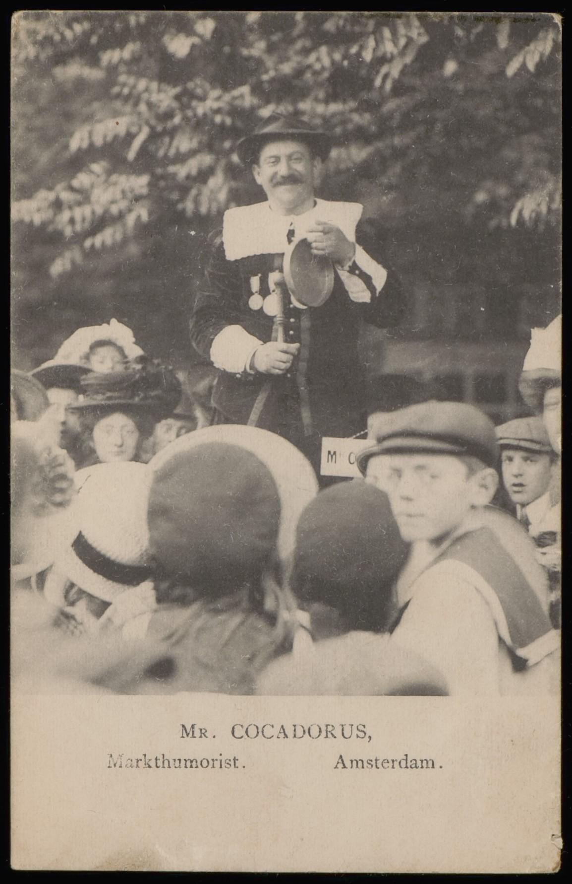 Beschrijving Amstelveld. Standwerker Meijer Linnewiel, alias Kokadorus (1867-1934) tussen zijn klanten Documenttype prentbriefkaart Vervaardiger Onbekend Anoniem Collectie Collectie Stadsarchief Amsterdam: prentbriefkaarten Datering 1910 ca. Geografische naam Amstelveld Inventarissen Afbeeldingsbestand PBKD00253000004